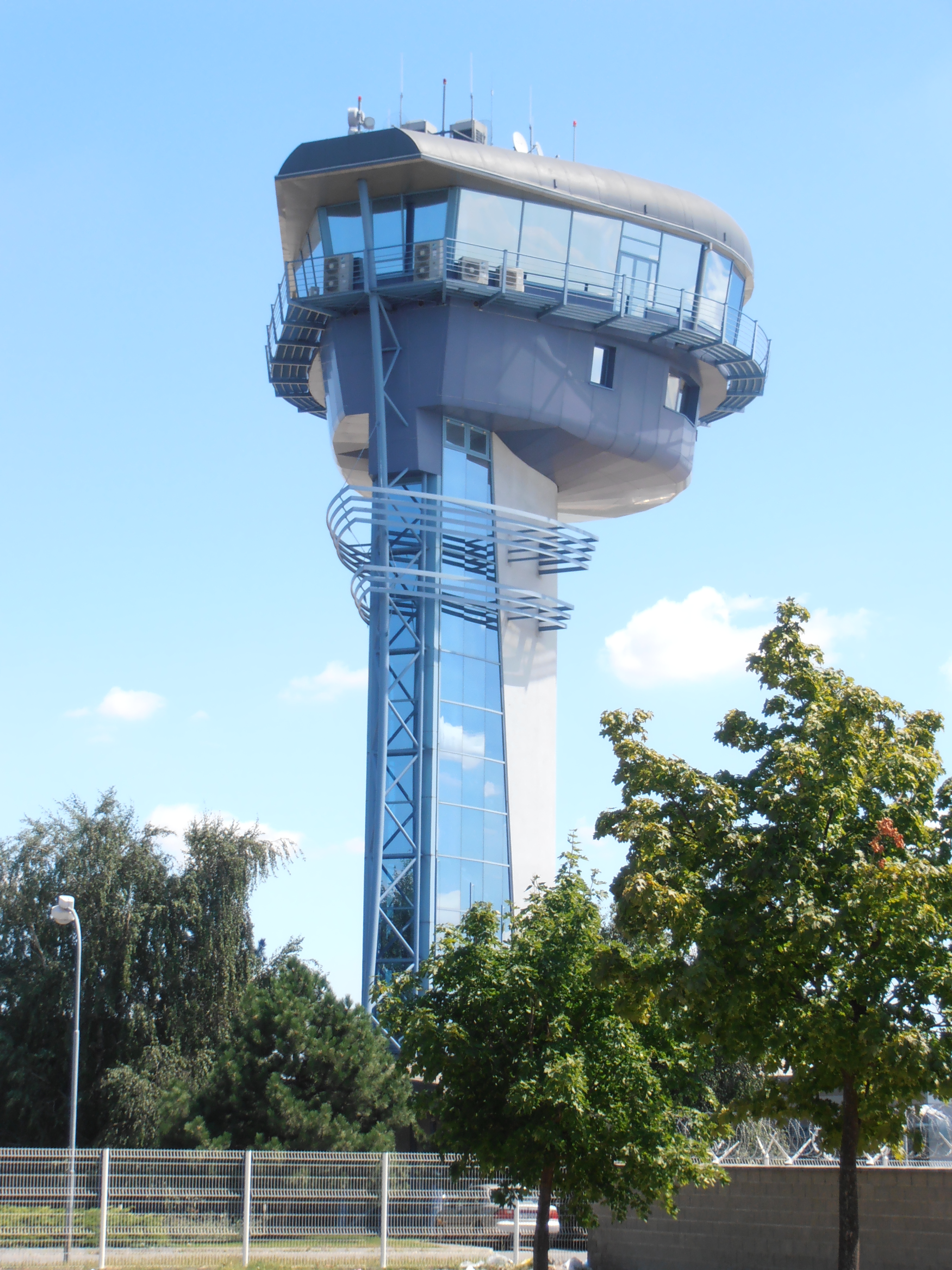 Riadiaca veža letiska M. R. Štefánika